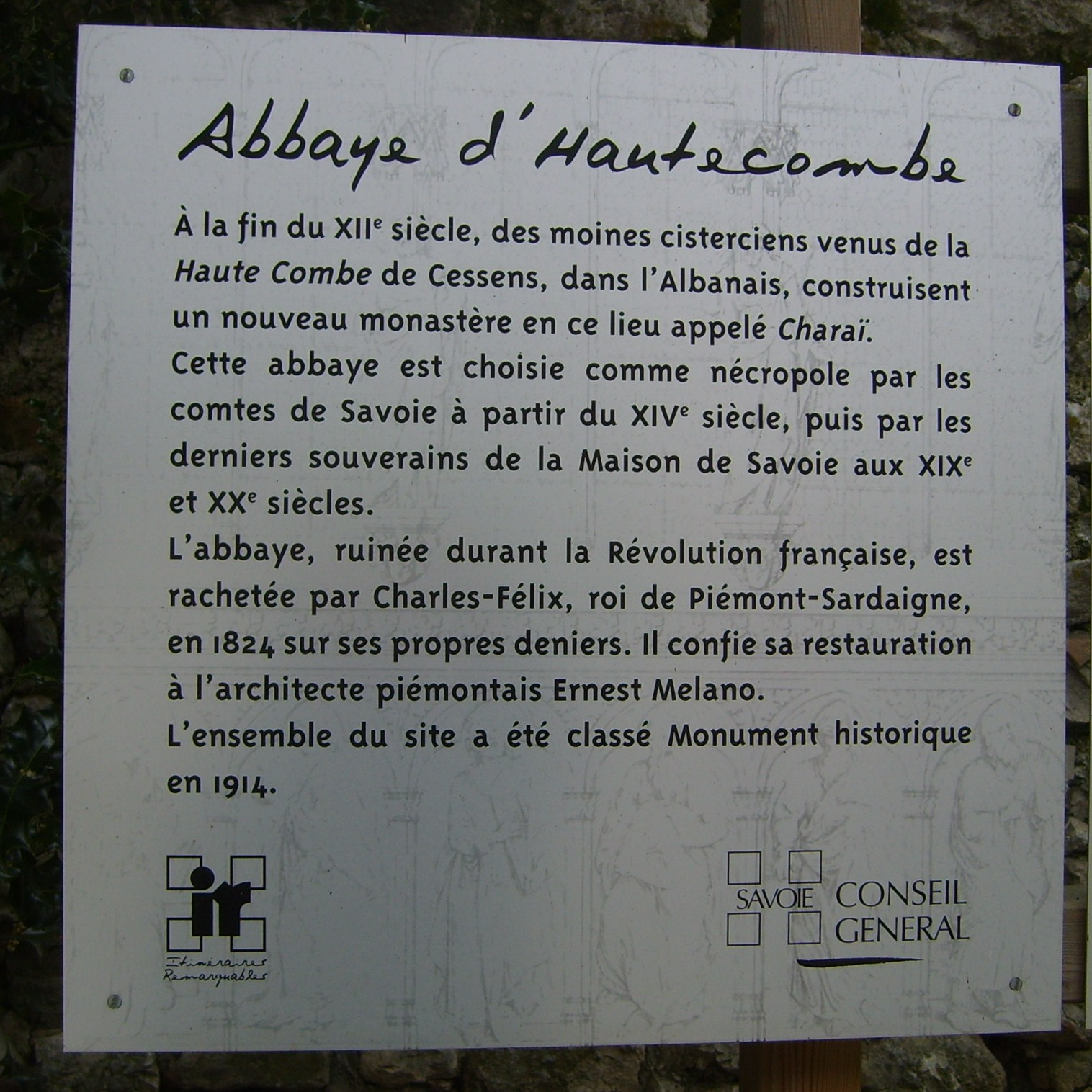 Plaque commémorative de Charles-Félix de Savoie se trouvant sur la facade de l'abbaye royale d'Hautecombe. Il est inhumé en l'abbaye royale d'Hautecombe (Nécropole des souverains de Savoie) en Savoie.